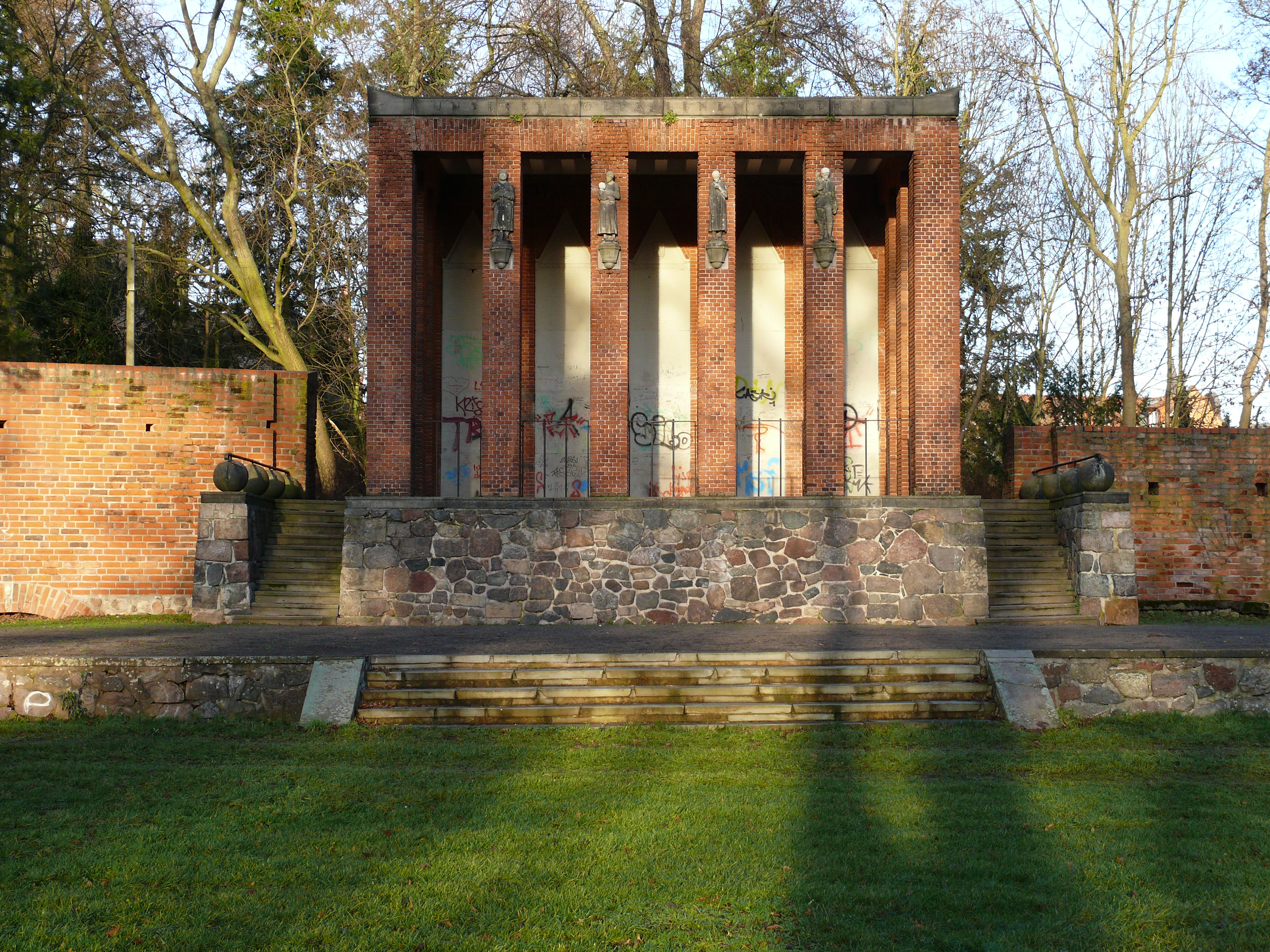 Ehrenhalle auf dem Gelände der ehemaligen Burg in Salzwedel, errichtet 1923 zum Gedenken an die Gefallenen des ersten Weltkrieges.